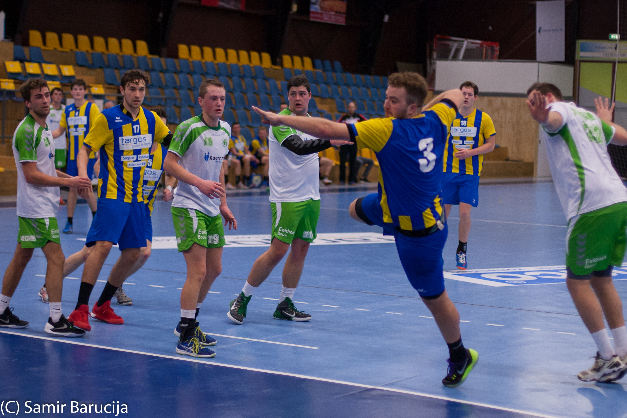 Bevo HC HS2 - Quintus